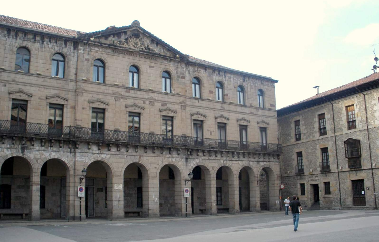 Real Seminario de Bergara (Gipuzkoa)